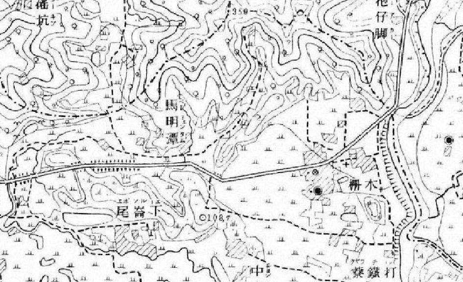 台灣堡圖中馬明潭地區（今台北市文山區木柵路、興隆路一帶）